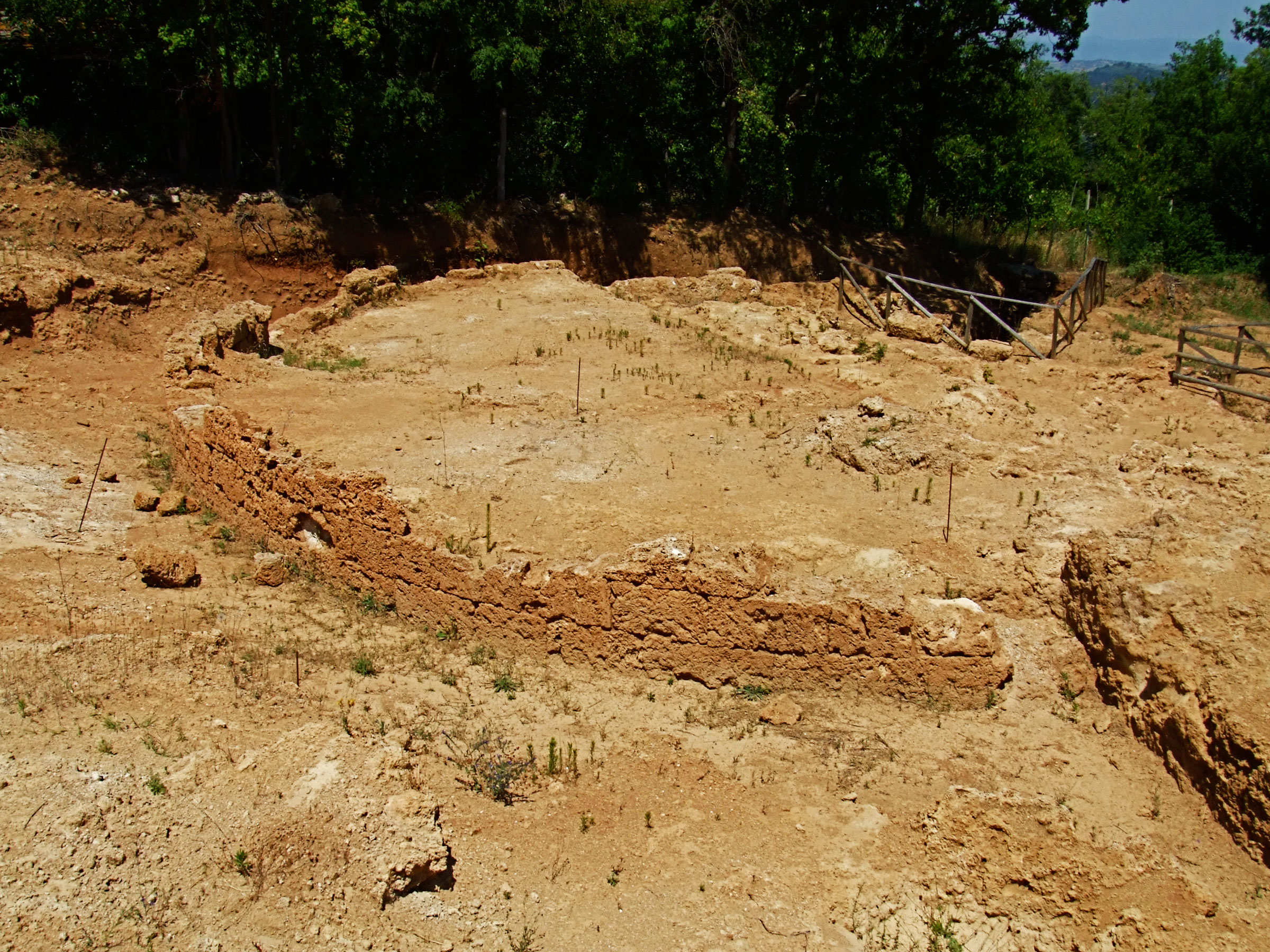 Structure ronde de la nécropole des Pianacce de Sarteano